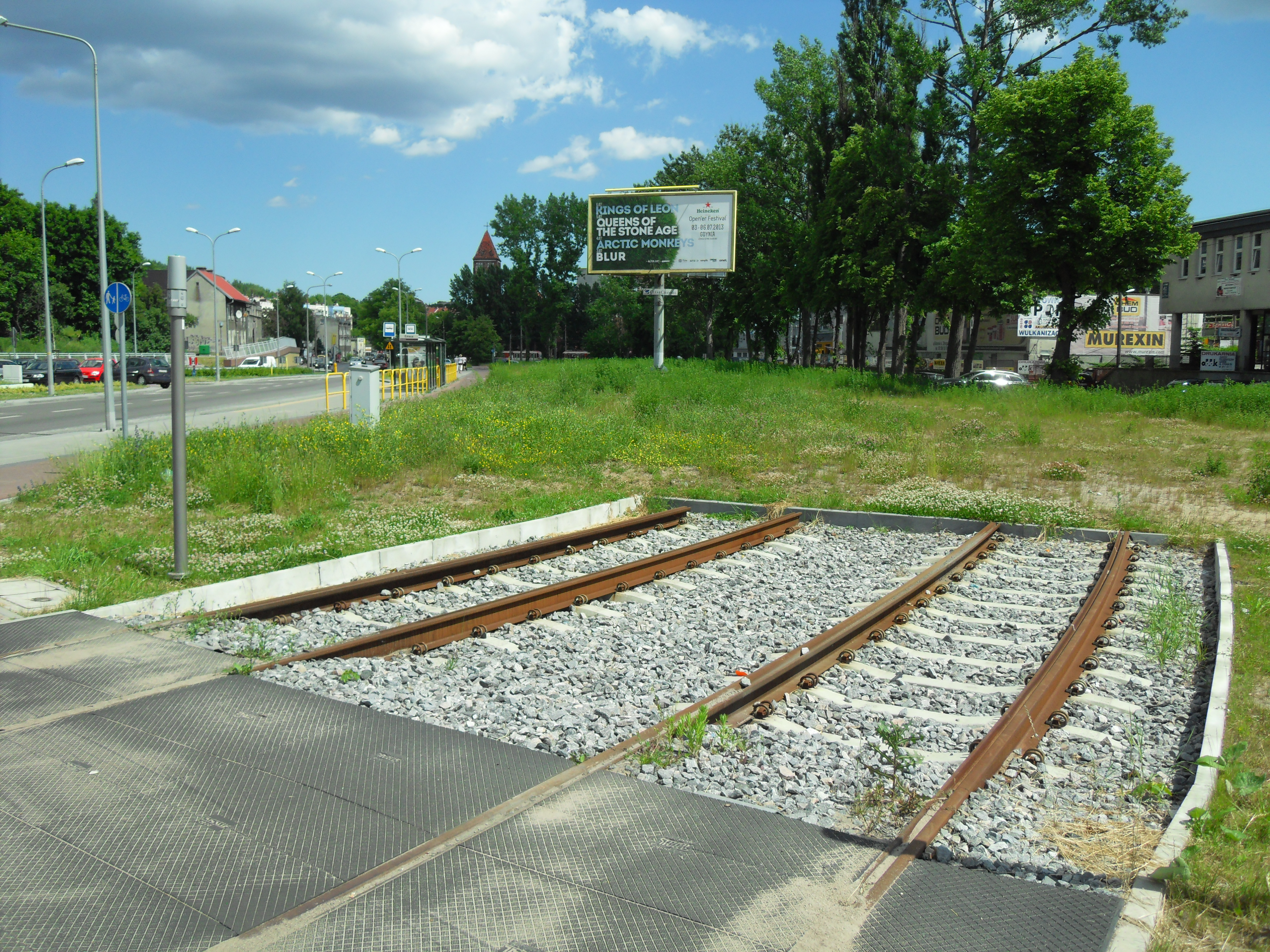 Gdańsk Siedlce, początek linii tramwajowej do dzielnicy Piecki–Migowo przy ul. Kartuskiej. Po prawej ul. Struga.